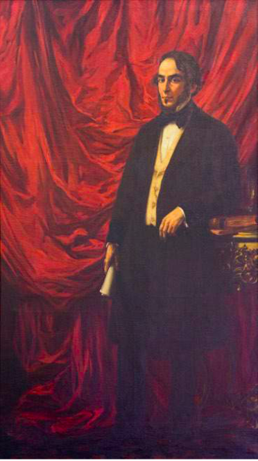 "Juan Bautista Alberdi", por Segismundo De Nass (1922). Óleo sobre tela 190x150 cm. Patrimonio artístico del Congreso de la Nación Argentina.